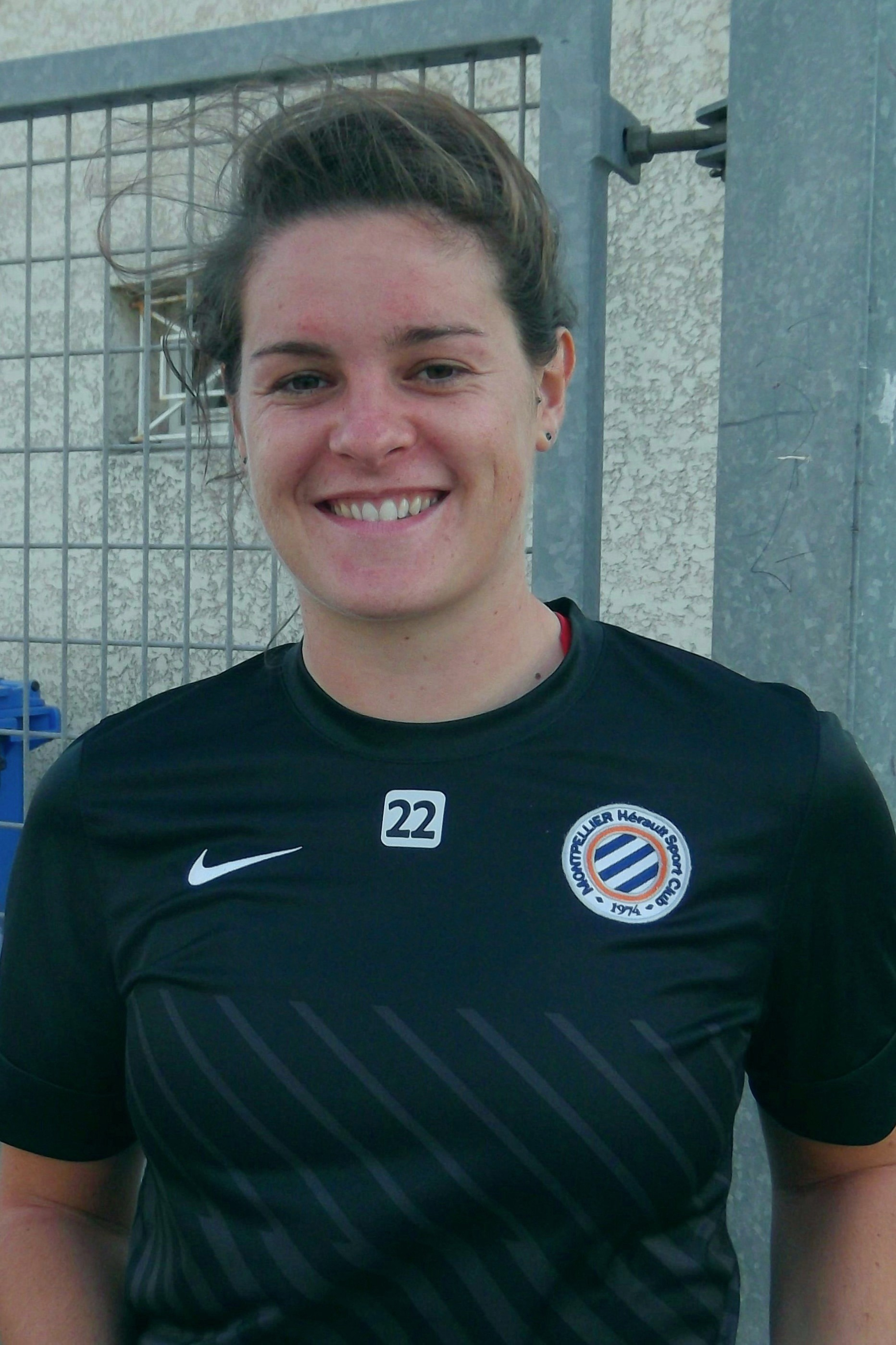 Jennifer Beattie (MHSC) en 2013.